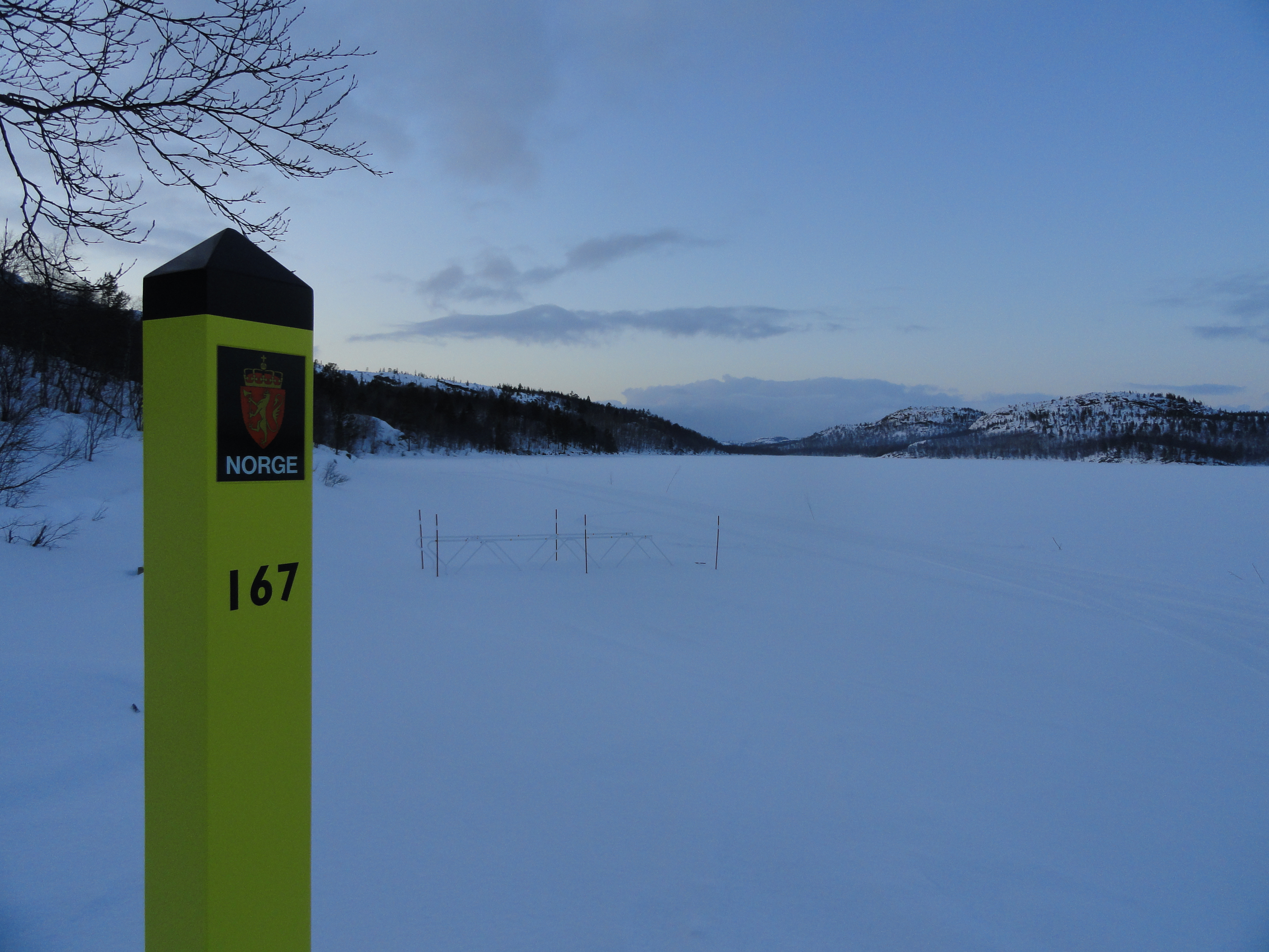 Bilde av norsk grensemerke 167